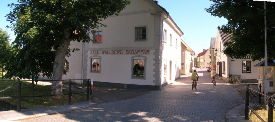 Söderköping, Storgatan, Söderköpings kommun, Sweden.